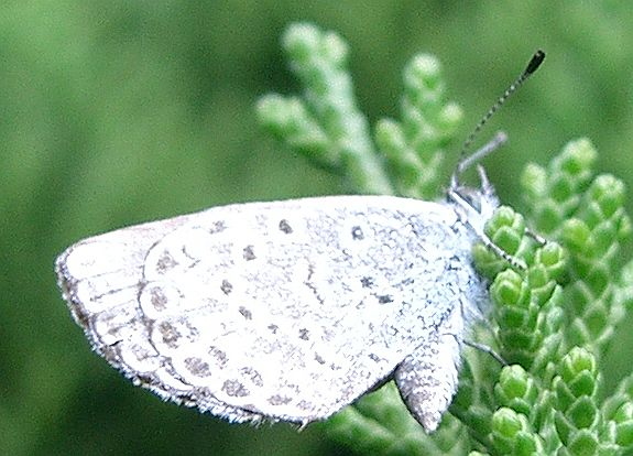 Zizeeria maha argia